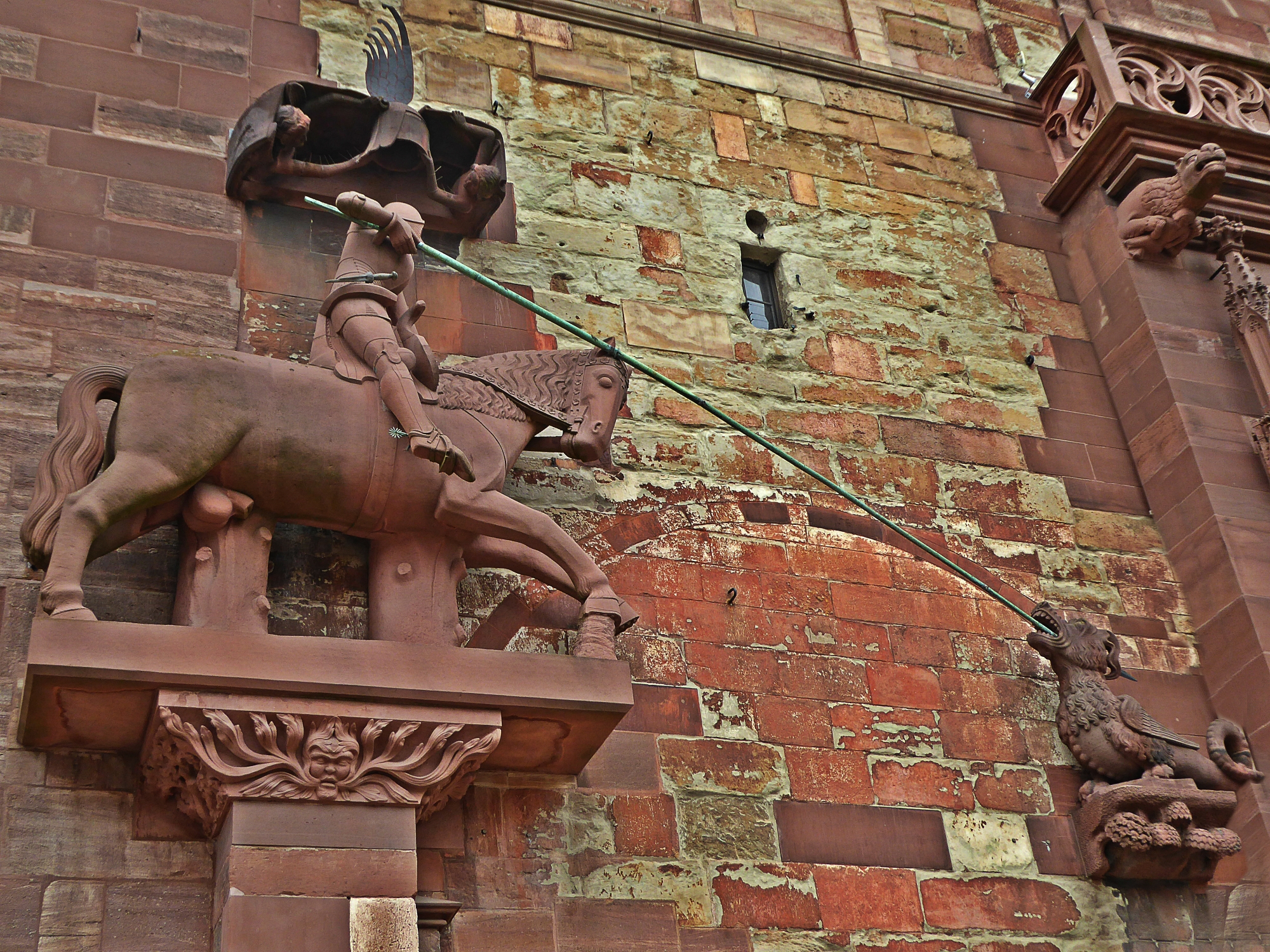 Skulptur. St.Georg, Drachentöter und Märtyrer am Basler Münster. Eine Kopie in Originalgrösse ist im Museum kleines Klingental (Basel) zu sehen.